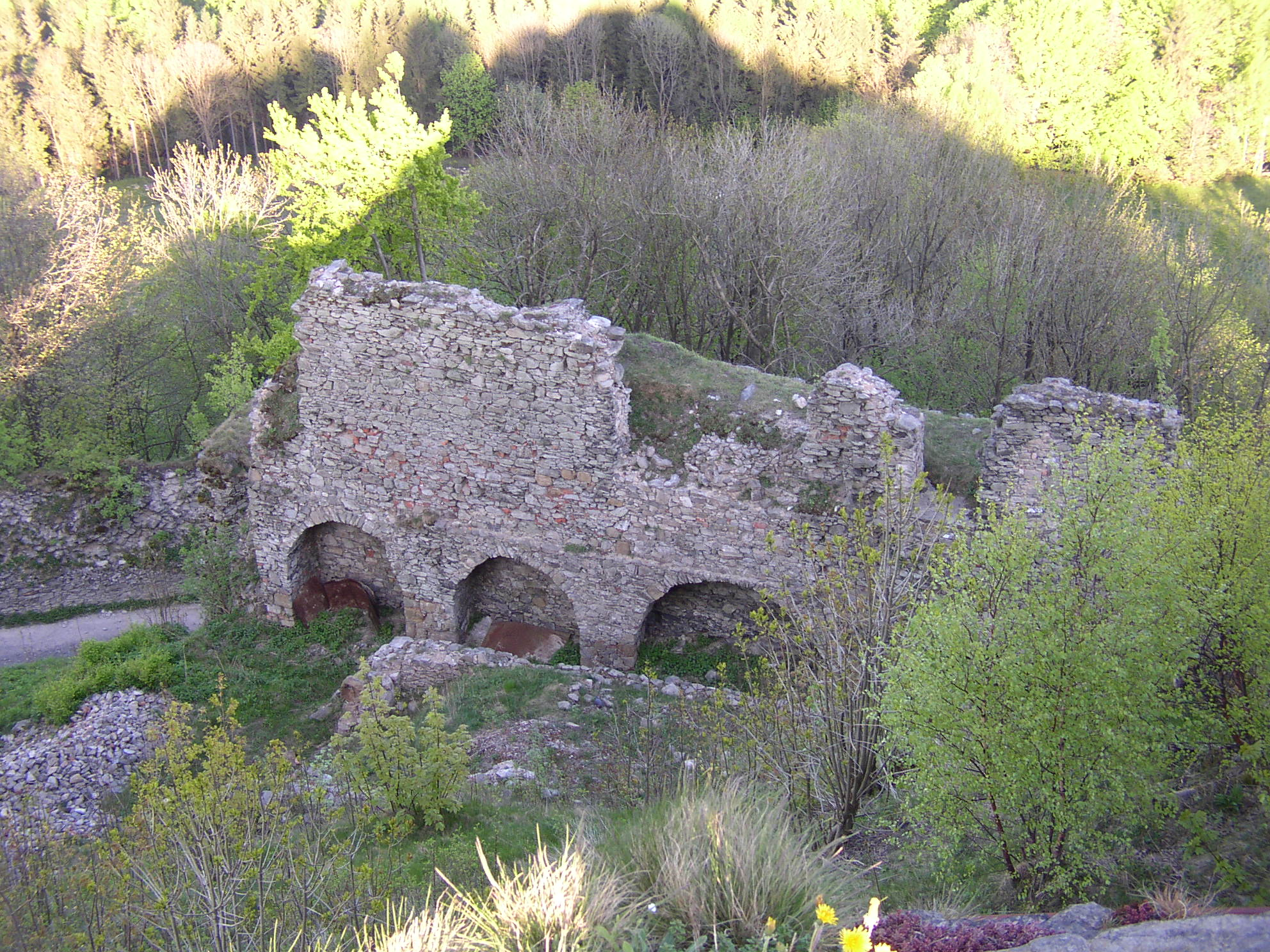 Zbytky hradního paláce na hradě Tolštejn